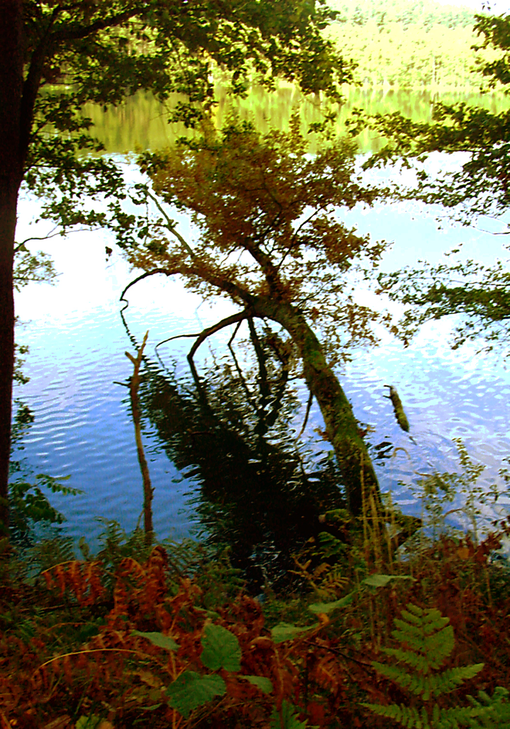 Puszcza Notecka, Jez. Kubek (Notecka Forest, Lake Kubek)